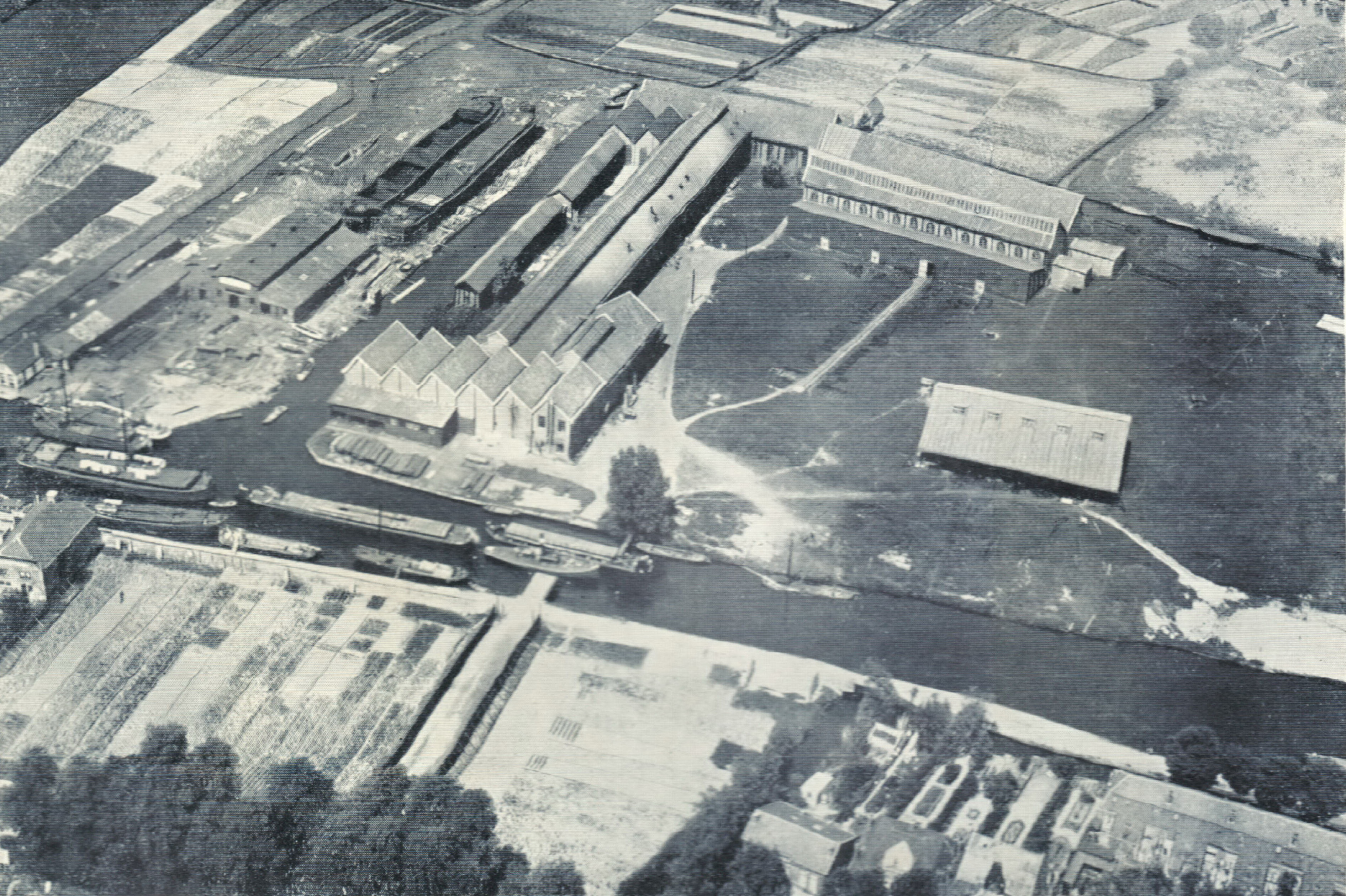 Koninklijke Nederlands Grofsmederij De Waard Leiden (ca 1925)